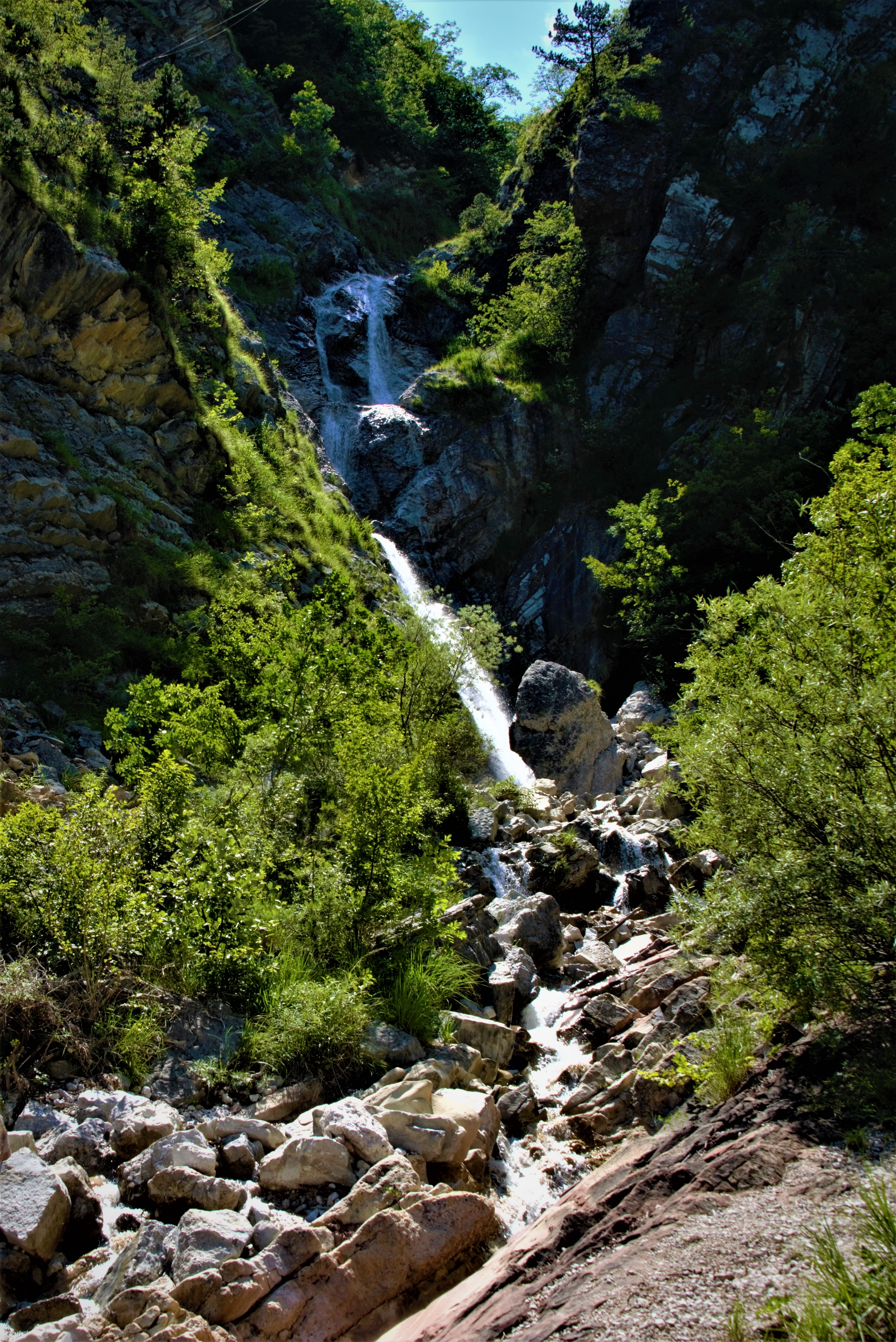 burrone di Ravina (Q49967181)